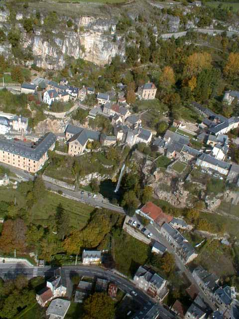 Partie du village de Salles-la-Source vue du ciel (annotations disponibles sur Commons).